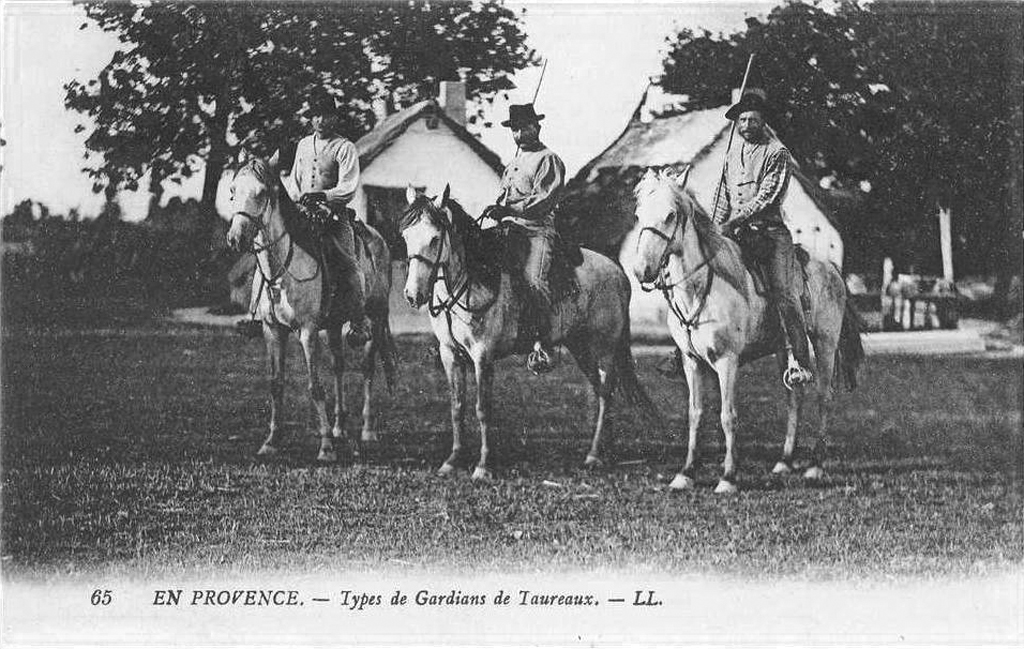 Types de gardians en Camargue dans les années 1900.